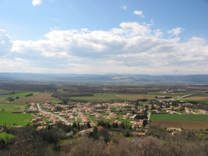 Le village d'Allan